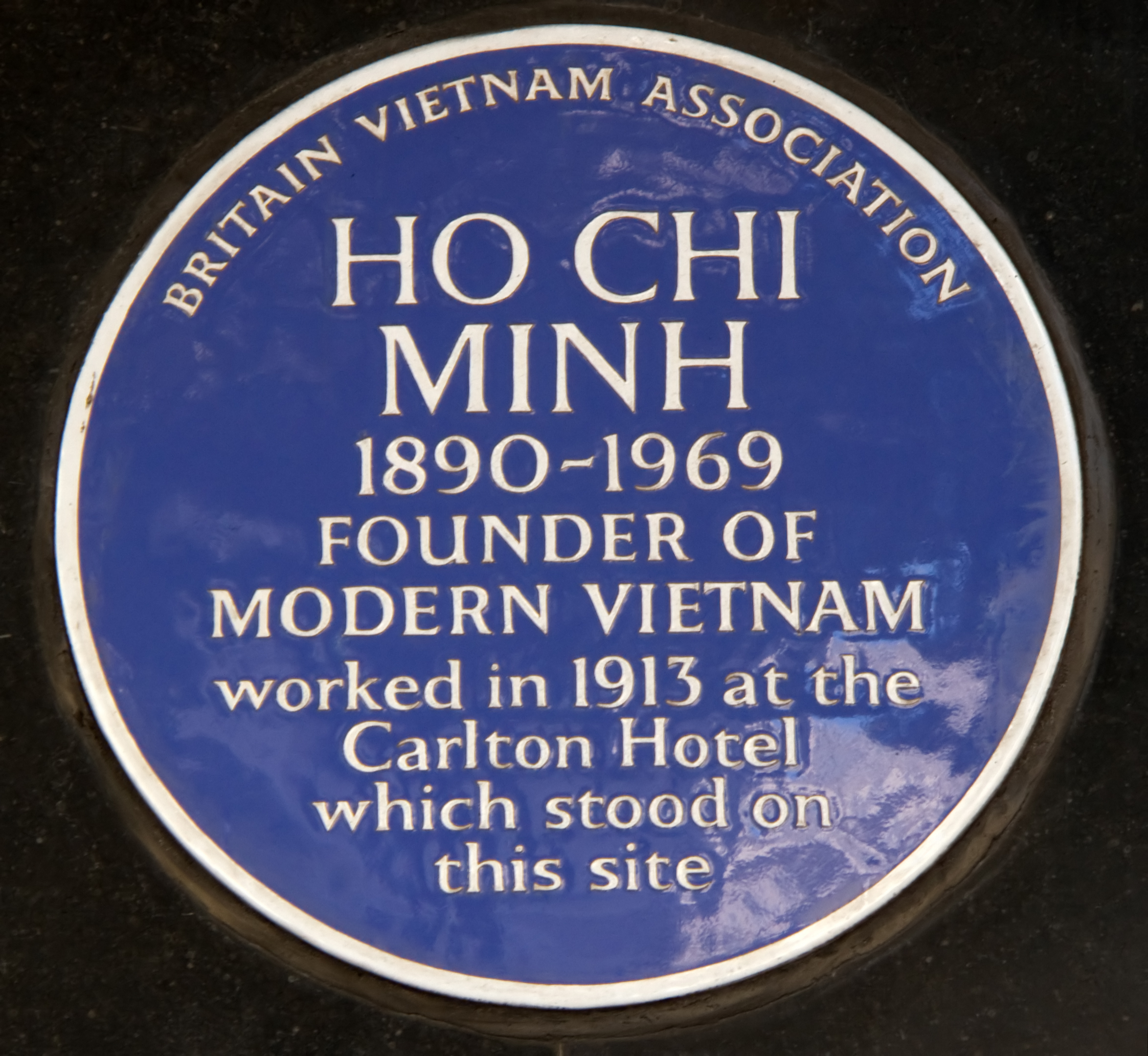 Ho Chi Minh Plaque